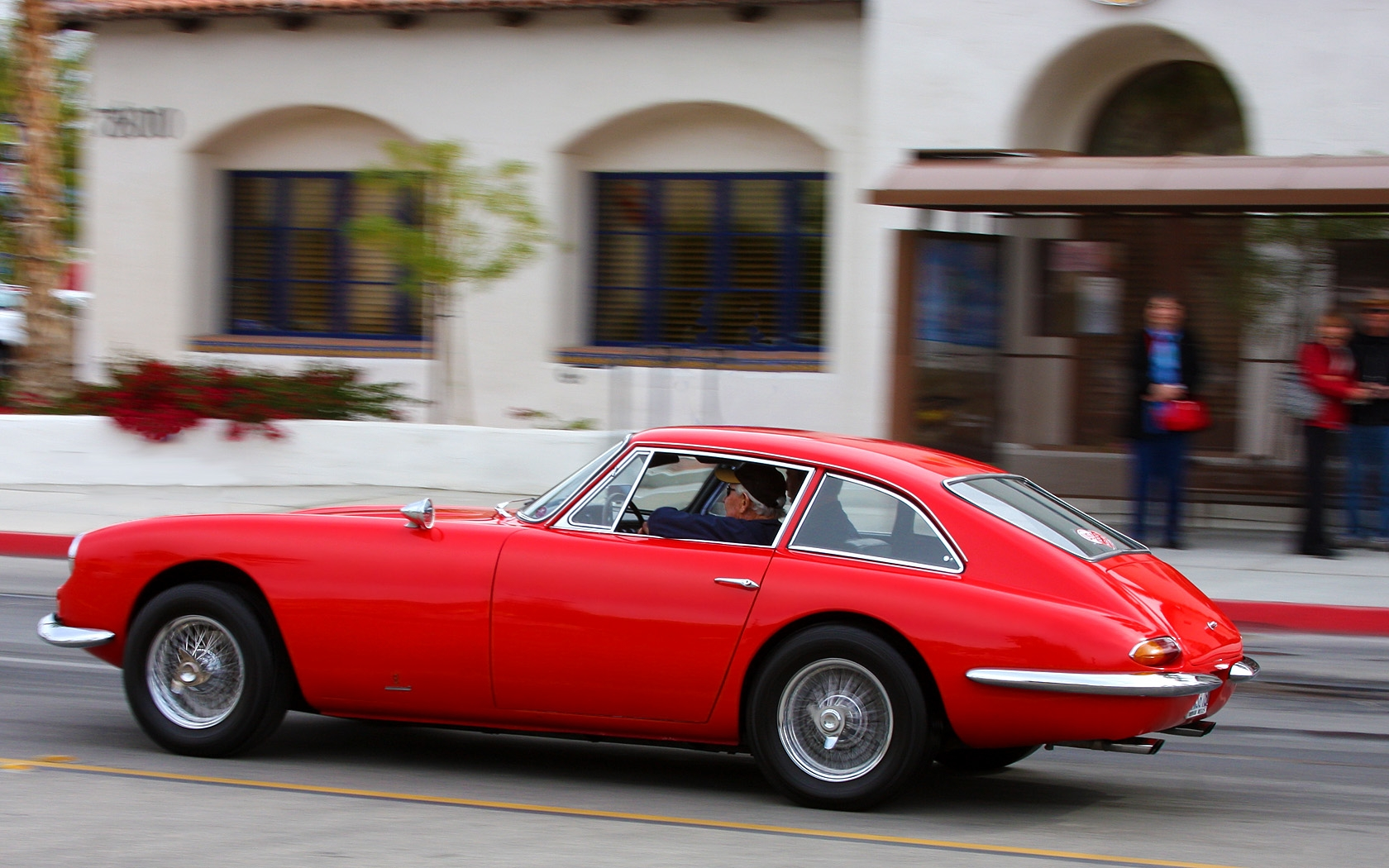 2011 Desert Classic, La Quinta, CA